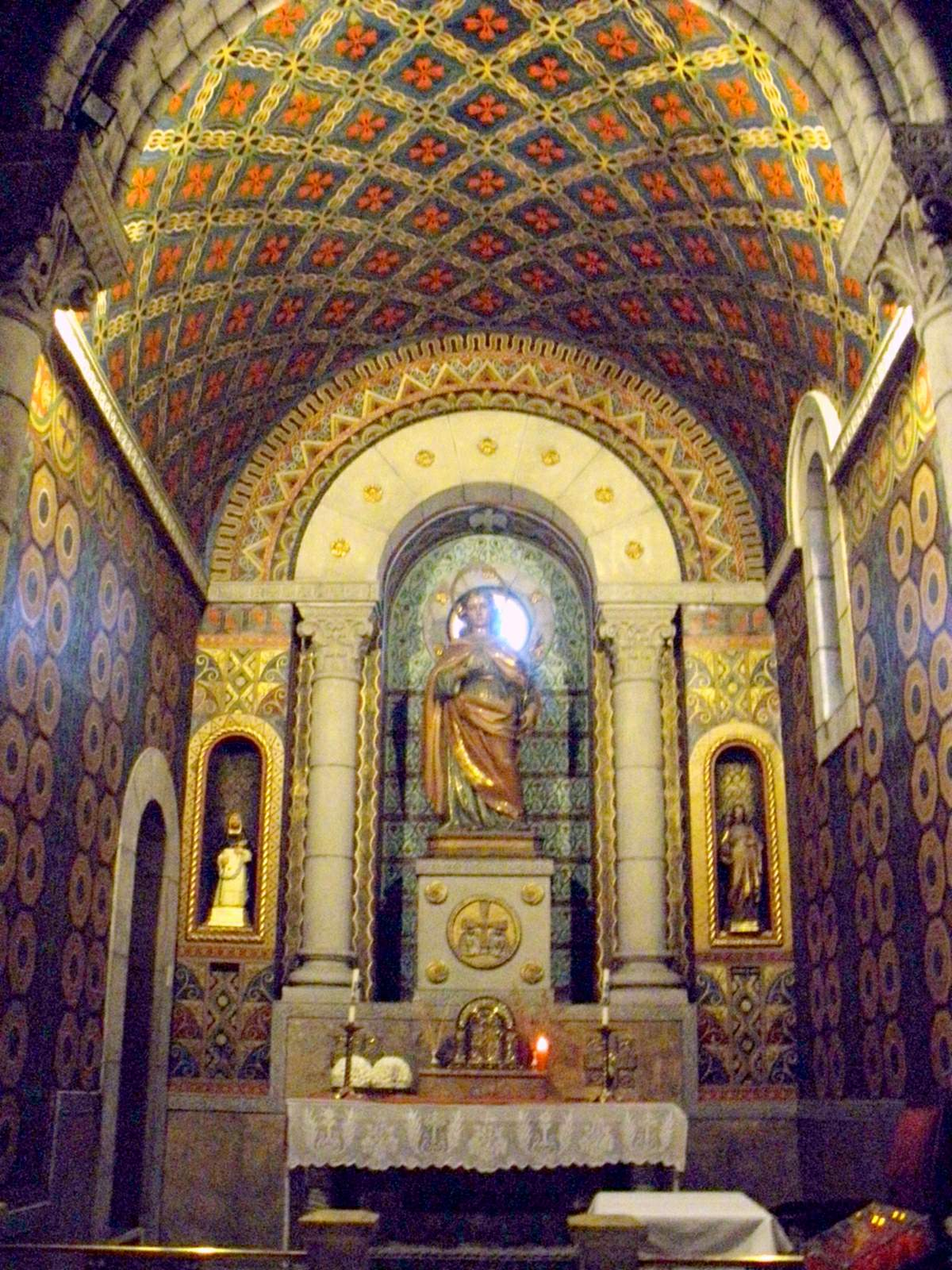 La Felguera (Langreo, Asturias)) - Iglesia de San Pedro